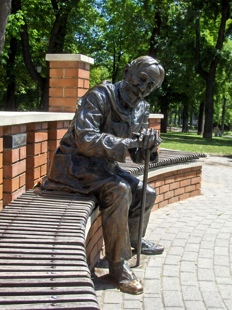 Jokai Mor szobra a Svabhegyen